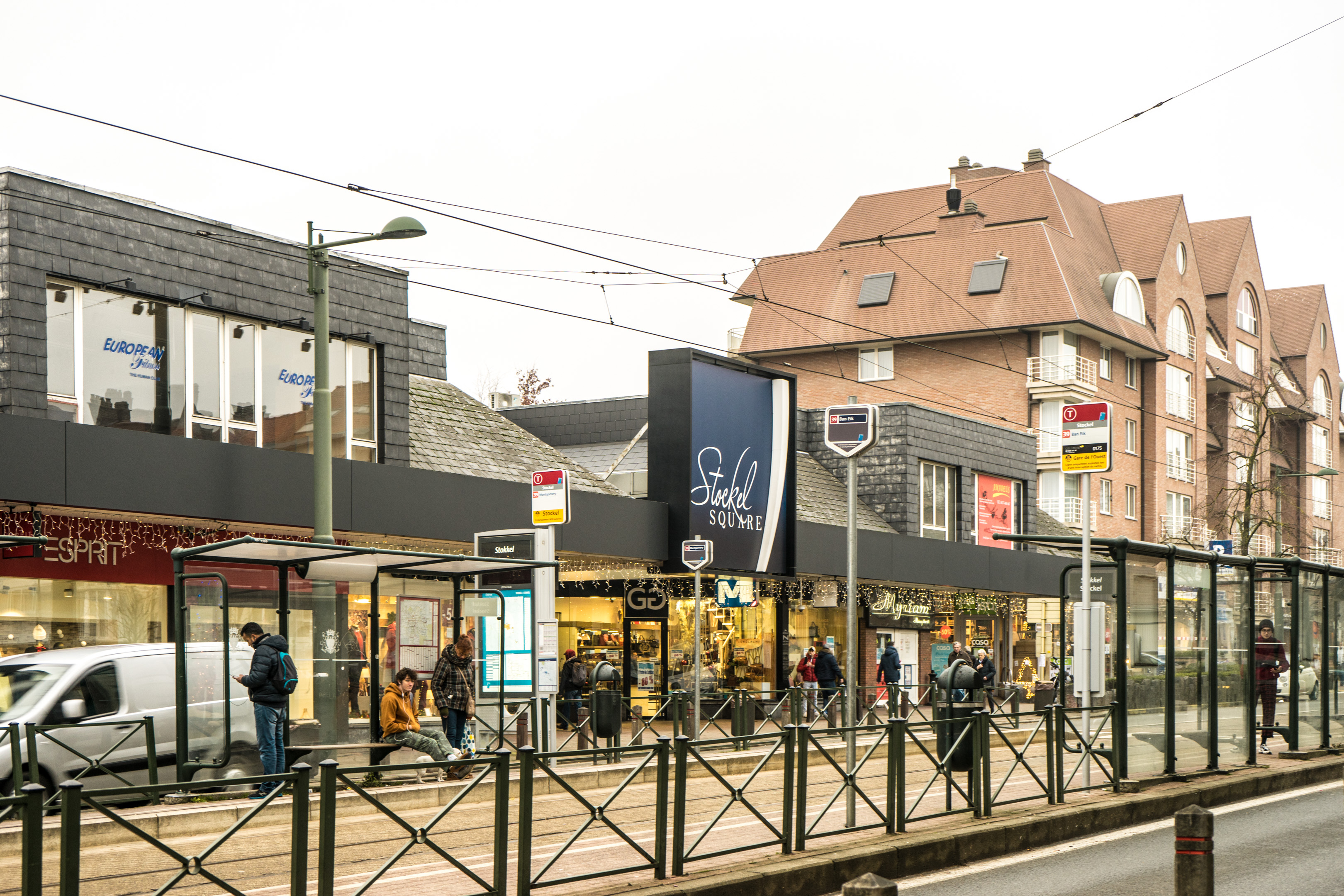 Entrée du metro Stockel